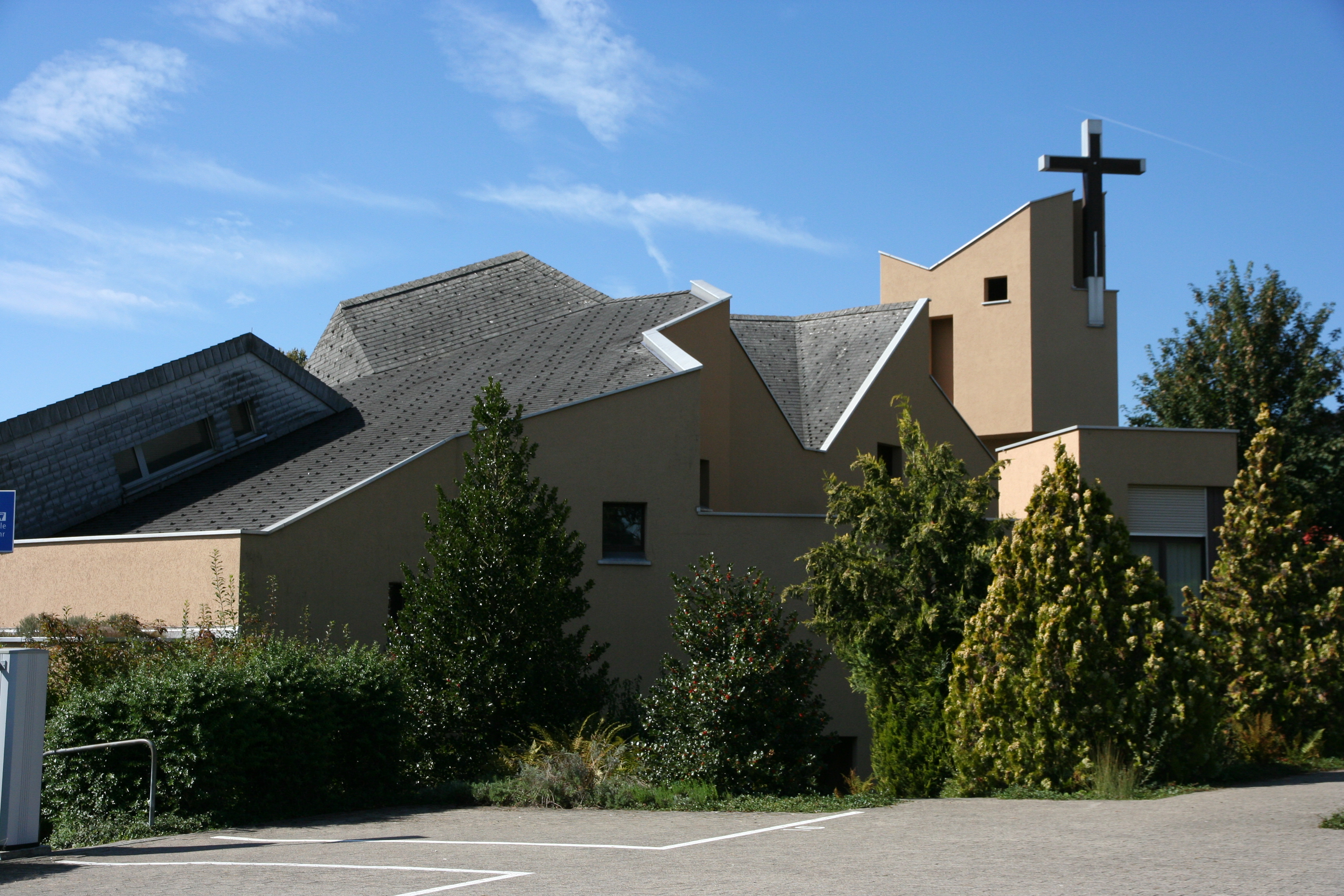 Römisch-katholische Kirche St. Franziskus Kempraten in Rapperswil-Jona